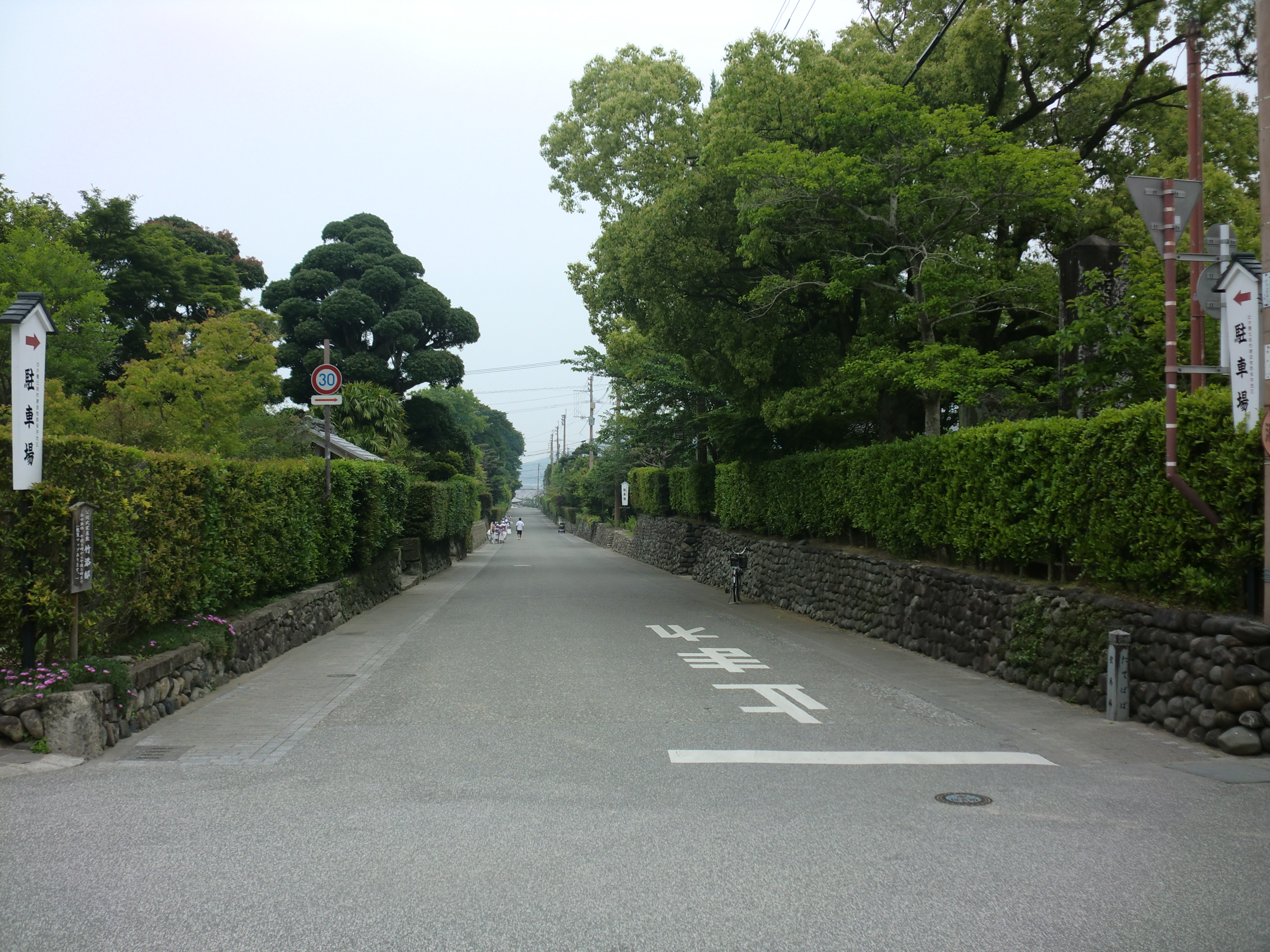 鹿児島県出水市にある出水麓武家屋敷内の竪馬場（たてばば）通り